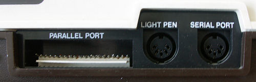 EACA EG2000 Colour Genie ports